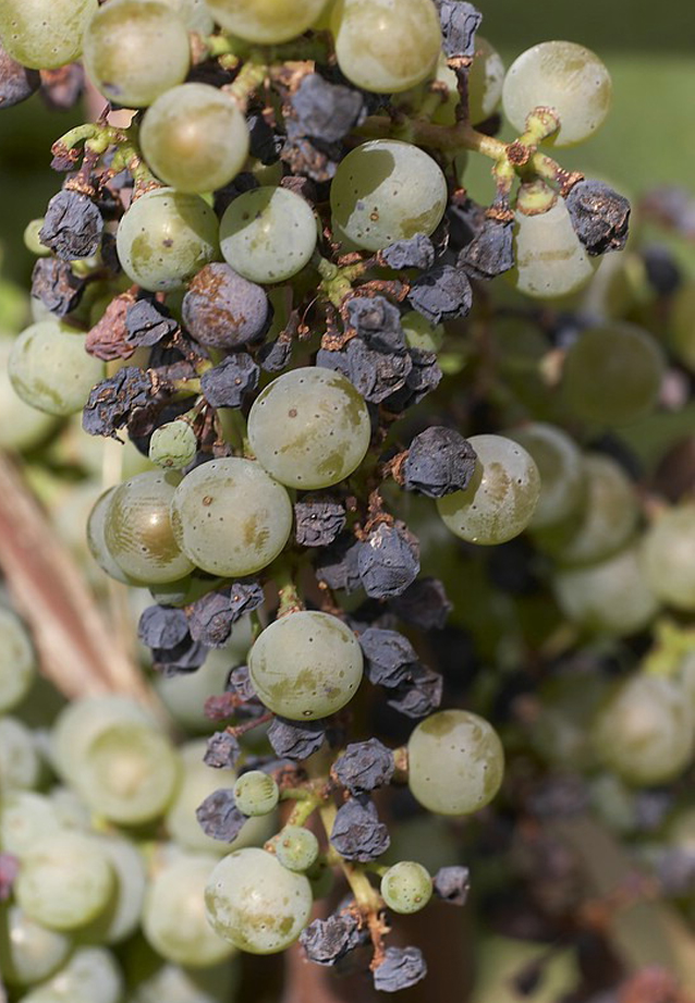 Schwarzfäule der Rebe